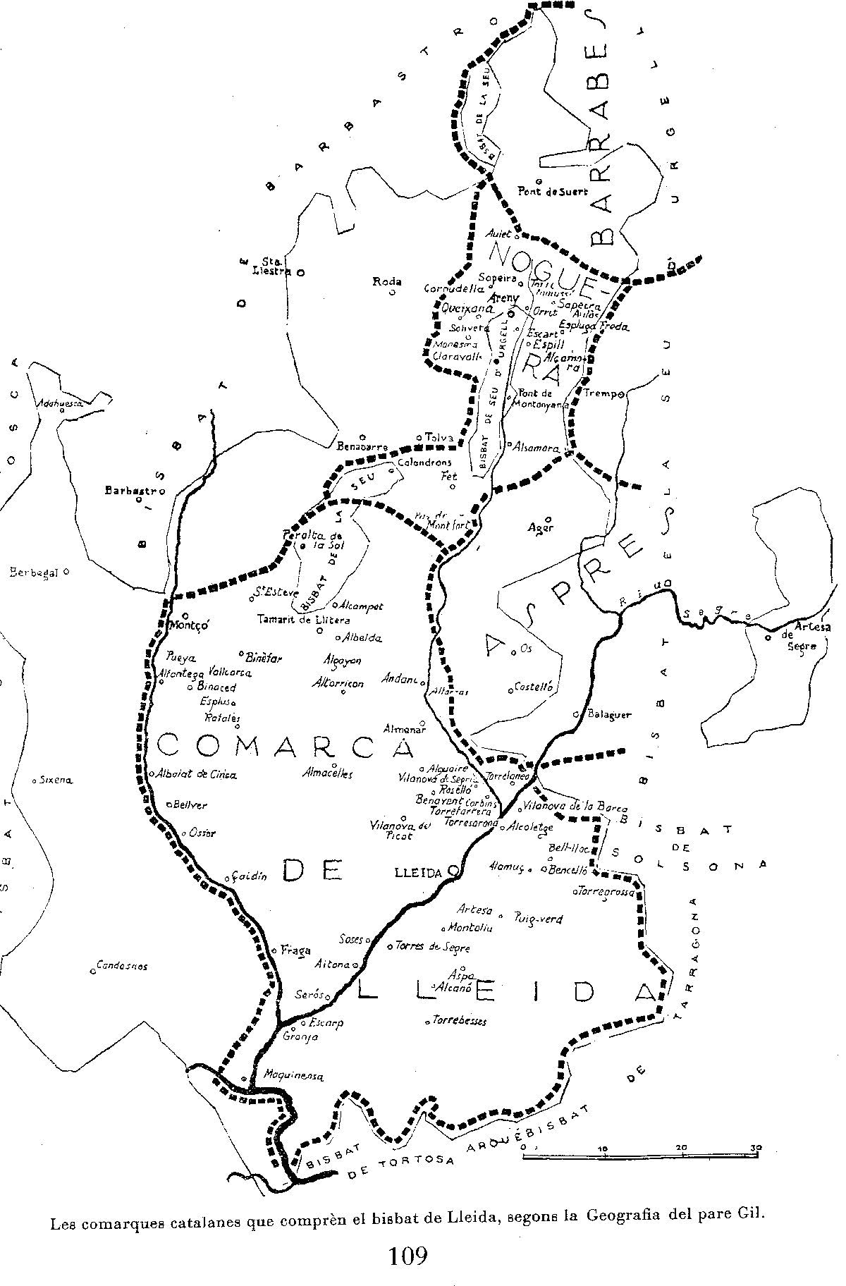 Les comarques catalanes que comprèn el bisbat de Lleida segons la geografia del pare Pere Gil i Estalella (any 1600)